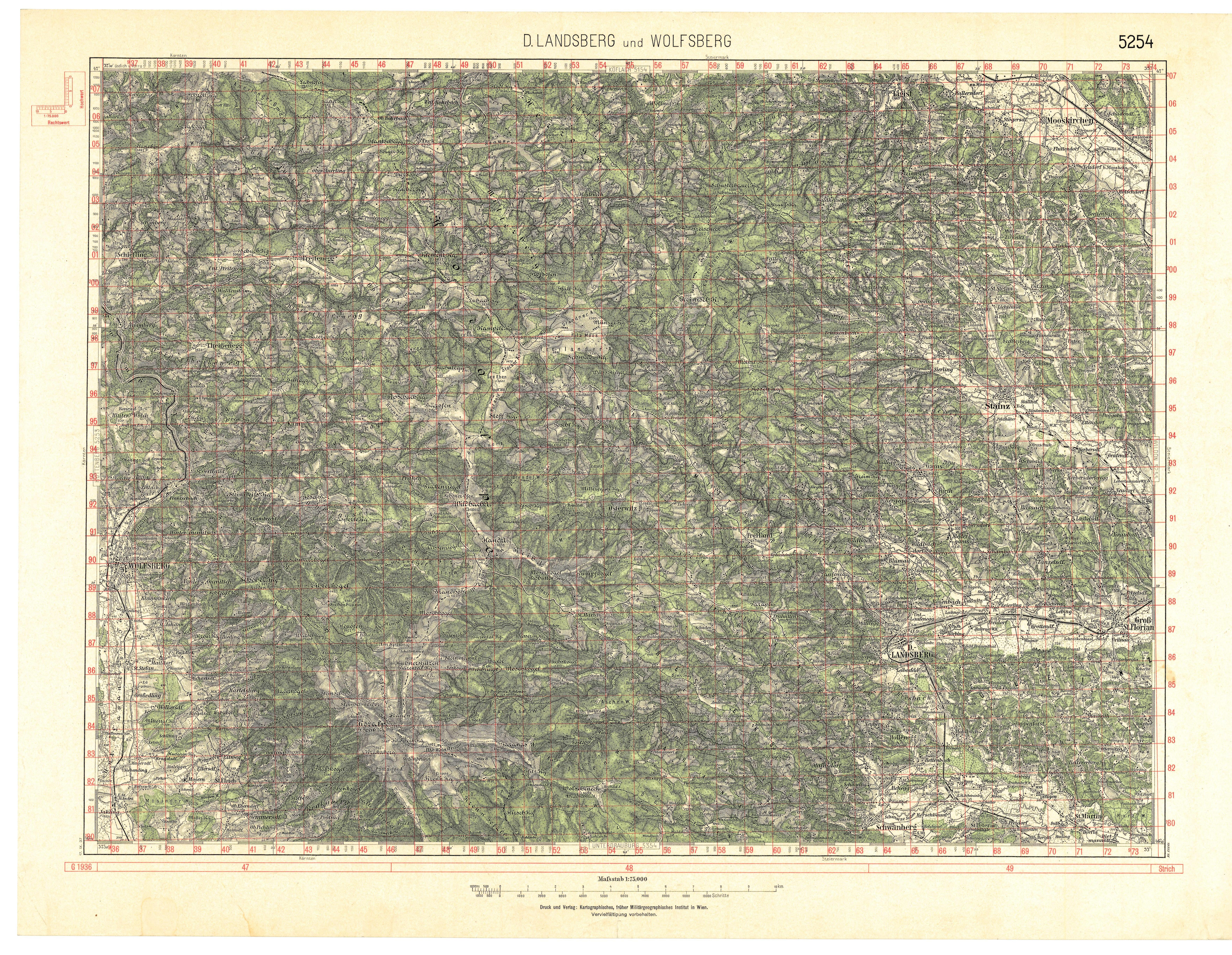 historische Landkarte: franzisco-josephinische (3.) Landesaufnahme der österreichisch-ungarischen Monarchie. Spezialkarte 1:75.000. Blatt D.Landsberg und Wolfsberg, Steiermark, Österreich. Nr. 5254 (Zone 18 Kolumne XII). Variante grüner Waldaufdruck und roter Raster des Meldenetzes.